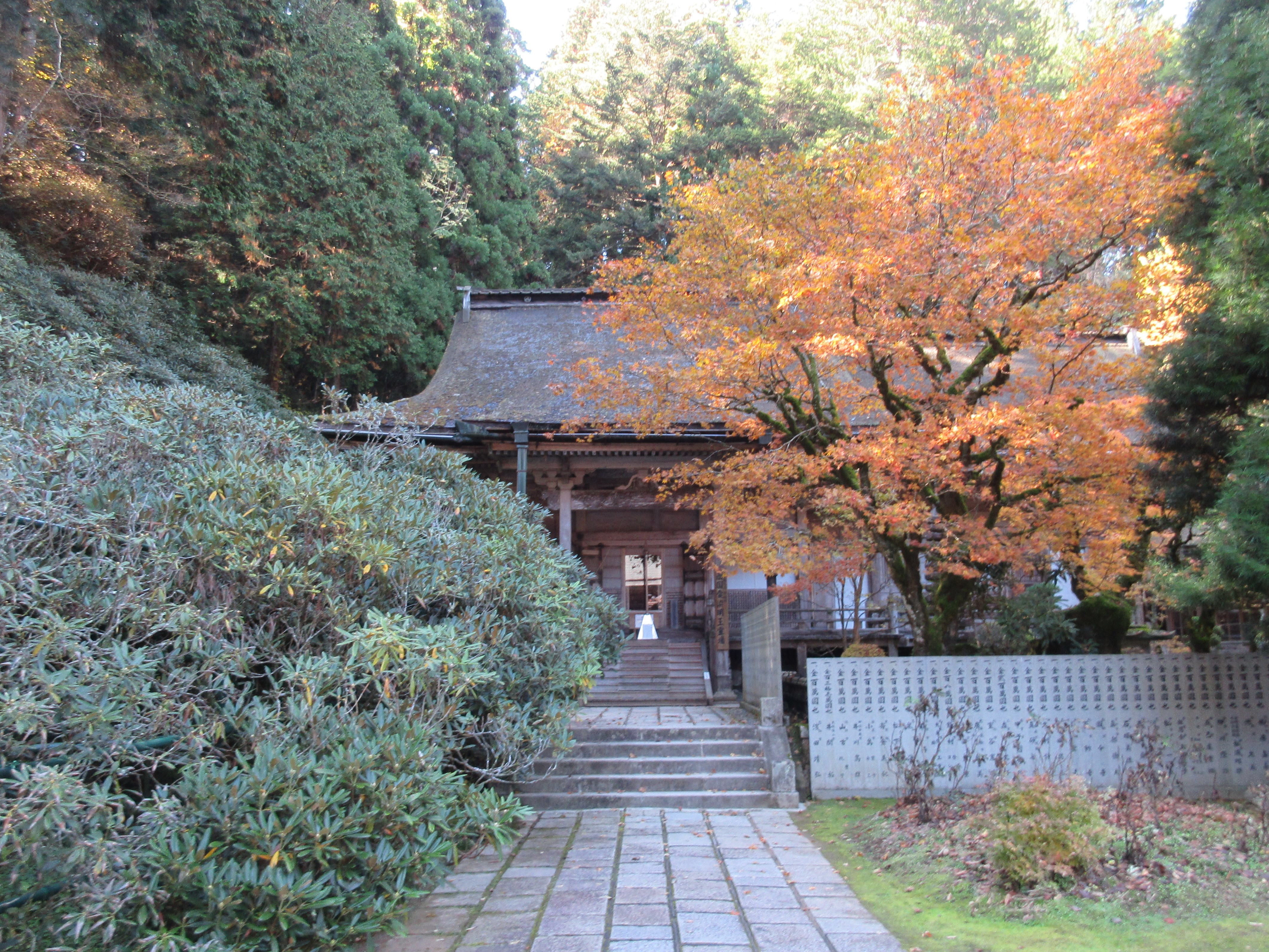 金剛三昧院本堂